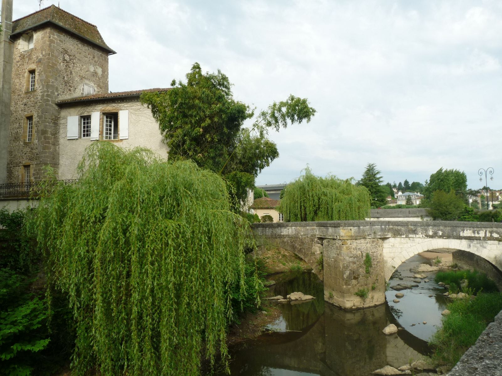 Pont sur le Goire, Confolens (Charente, France)